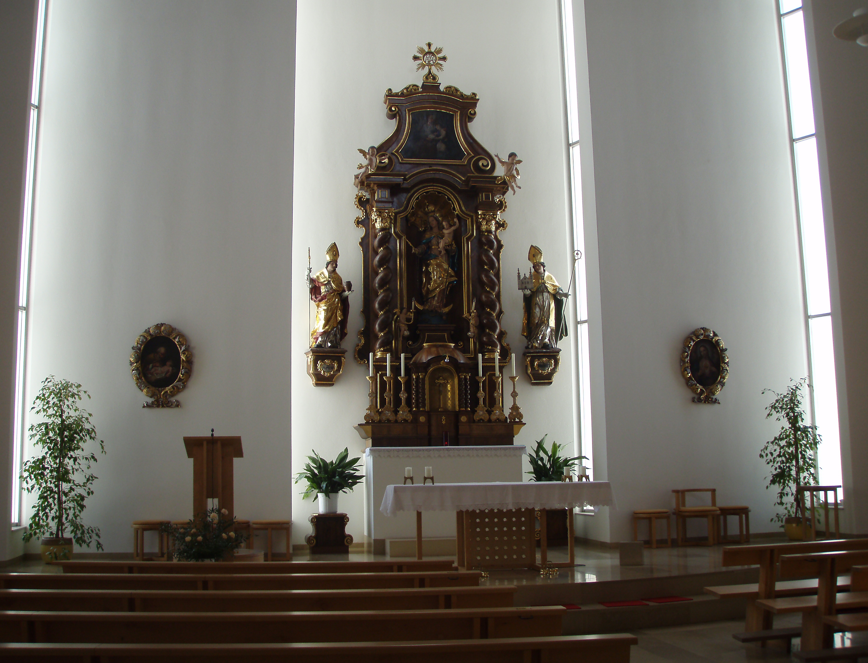 Das Bild zeigt den Hochaltar in der Kath. Pfarrkirche hl. Maria in Maishofen, Land Salzburg.